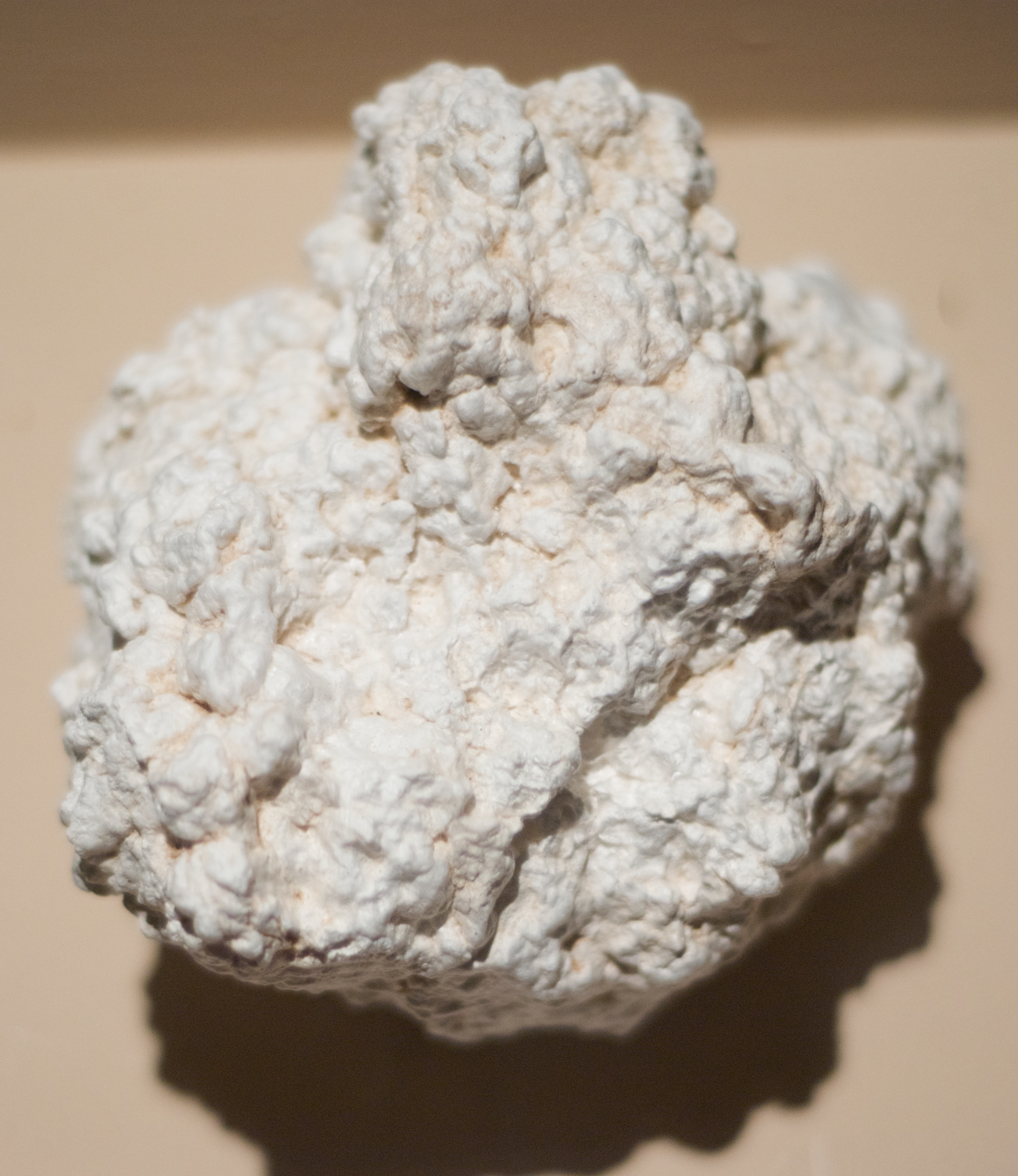 Salta, Argentina. Ulexita Borato.